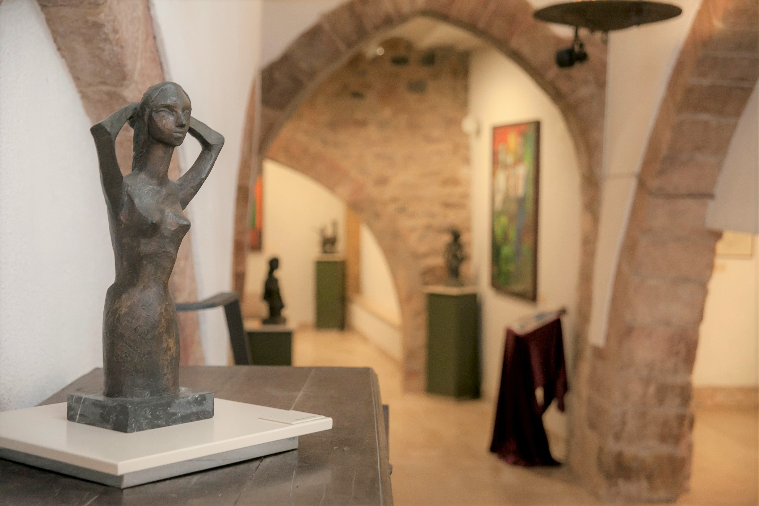 Museu Palau Ferré Montblanc